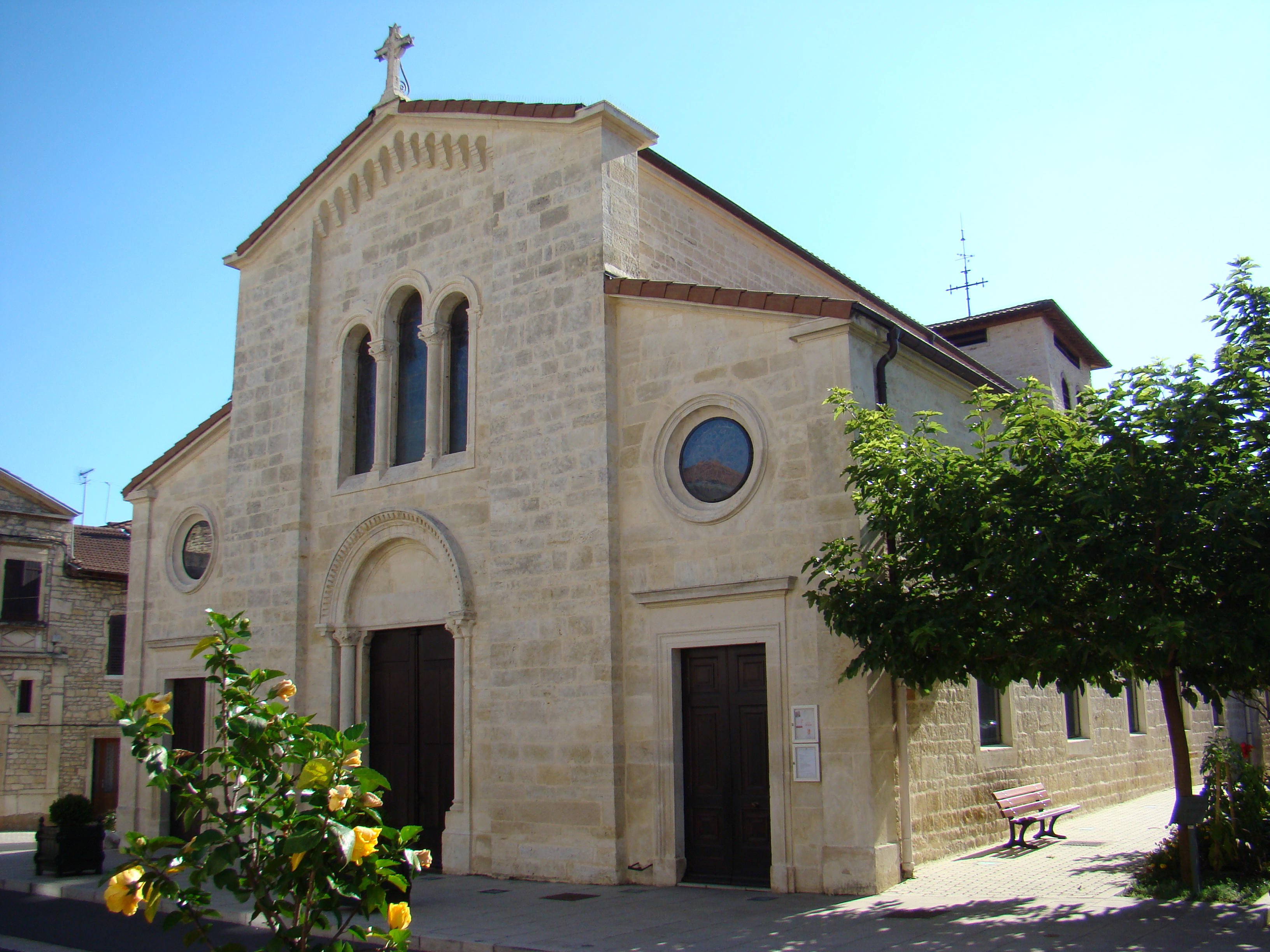 Eglise de Lucenay